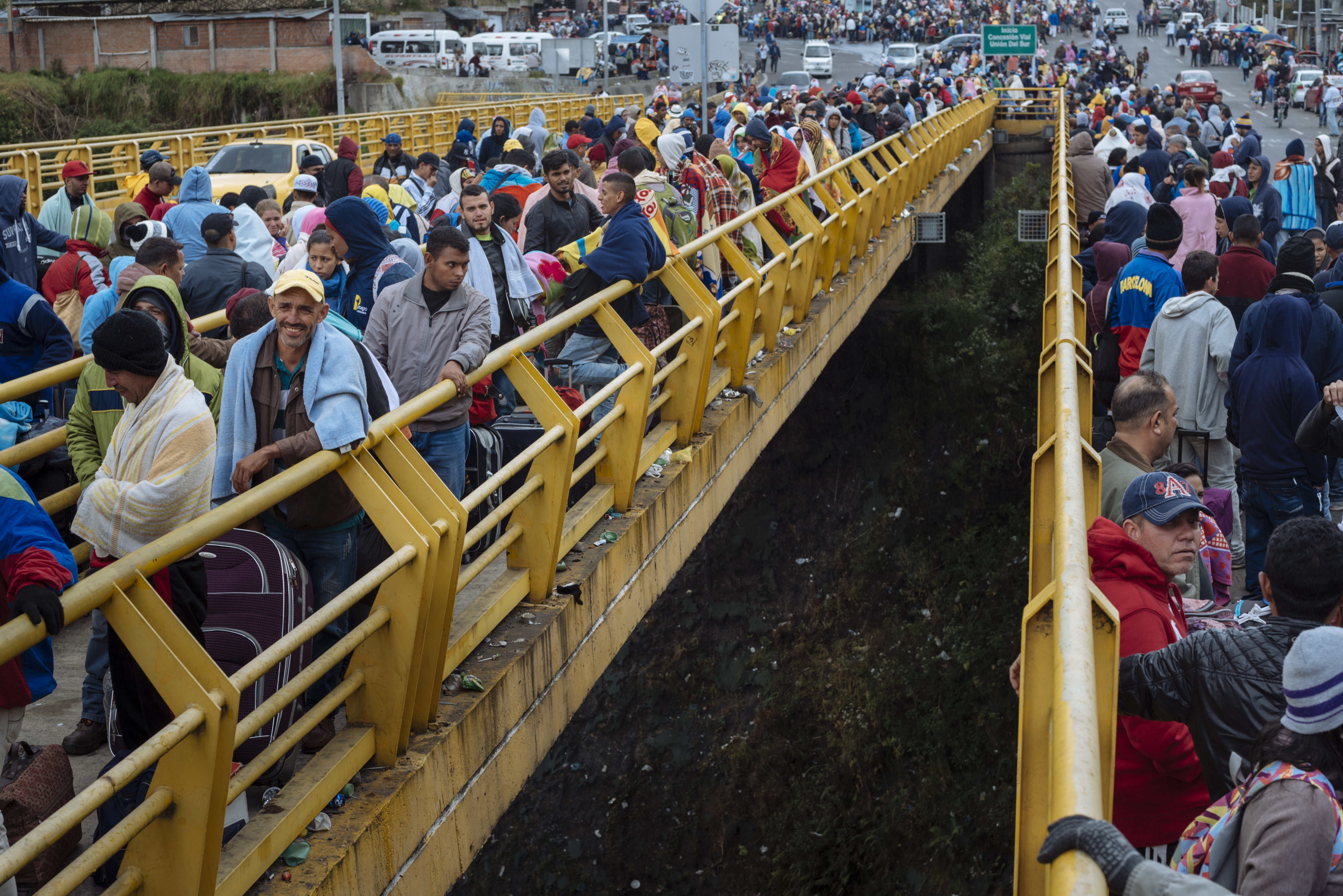 Cientos de venezolanos en situación de movilidad humana esperan en la fila de la Aduana en Ecuador para sellar sus pasaportes y continuar con su viaje. En agosto de este año entraron a diario entre 3000 y 7000 venezolanos a Ecuador, la mayoría de ellos están en tránsito hacia Perú. Algunas familias deben pasar la noche en el Puente Rumichaca, frontera entre Colombia y Ecuador, donde las temperaturas bajan hasta los 3 grados centígrados.